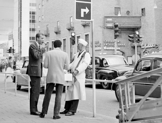 Sveavägen söderut vid Kungsgatan. T.h. Konserthuset. Korvgubbe med låda på magen samt kunder